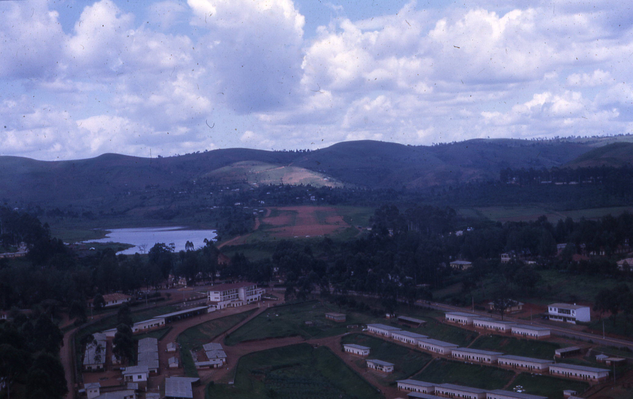 Le DC3 va bientôt se poser, Cameroon.